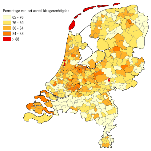 Opkomstpercentage per gemeente, bij de Tweede Kamerverkiezingen 2010